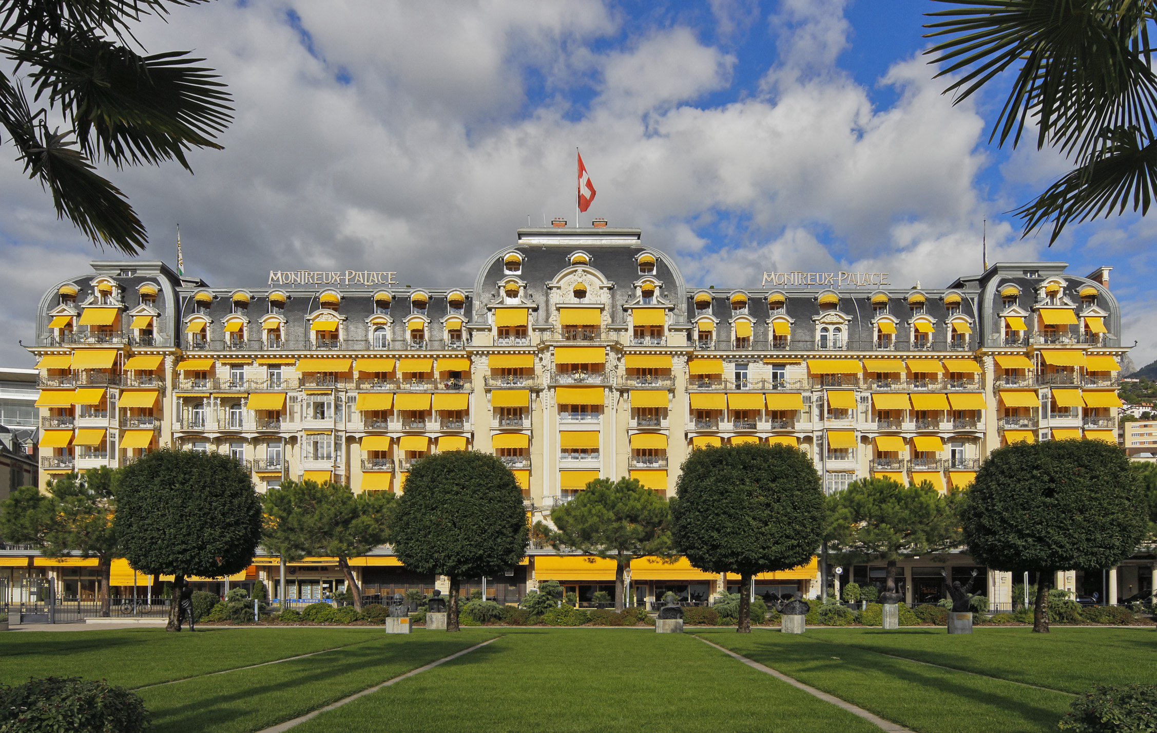 Le Montreux-Palace, Avenue Claude-Nobs 2, 1820 Montreux. Hôtel-Palace 5 étoiles à Montreux